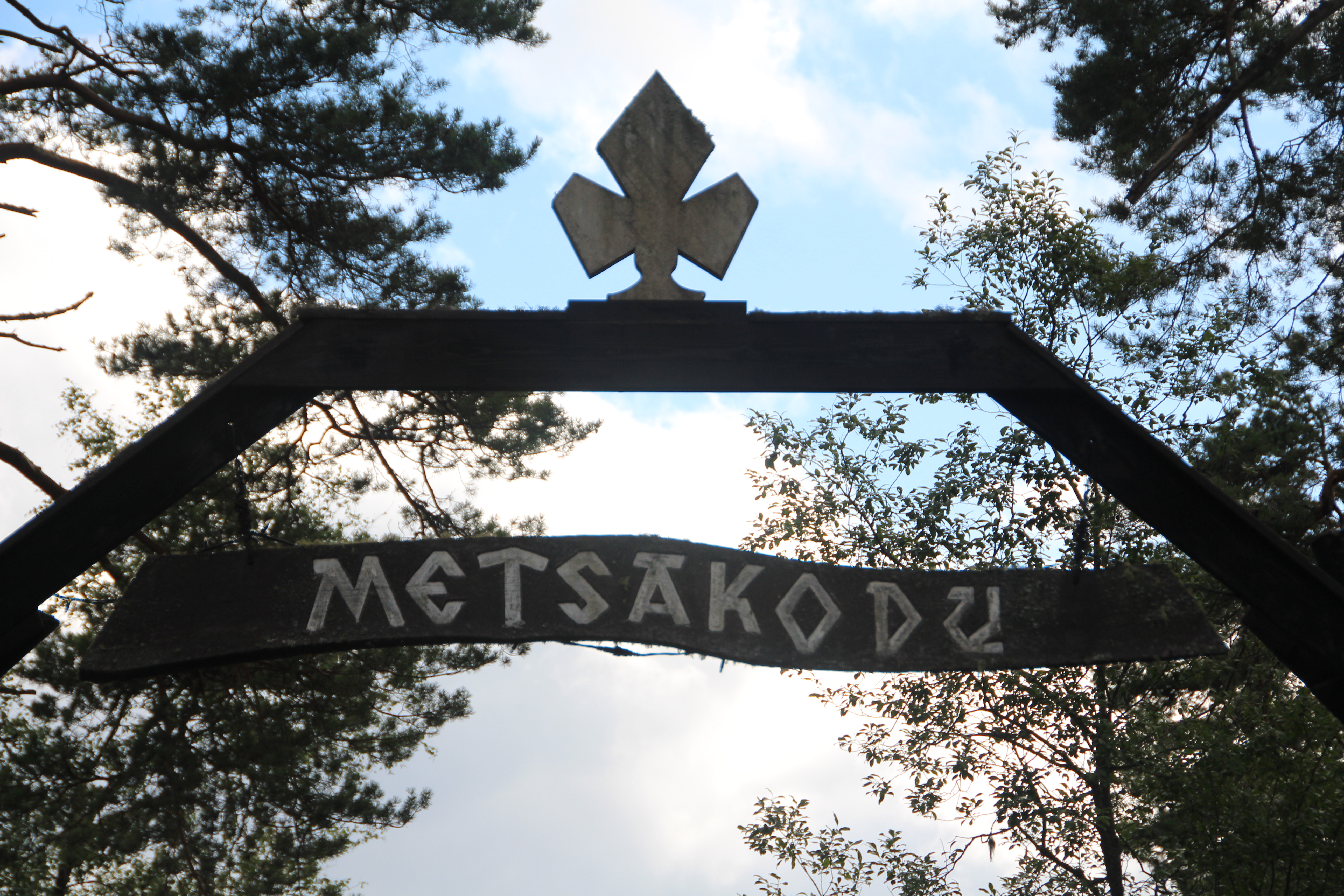 Metsakodu värav